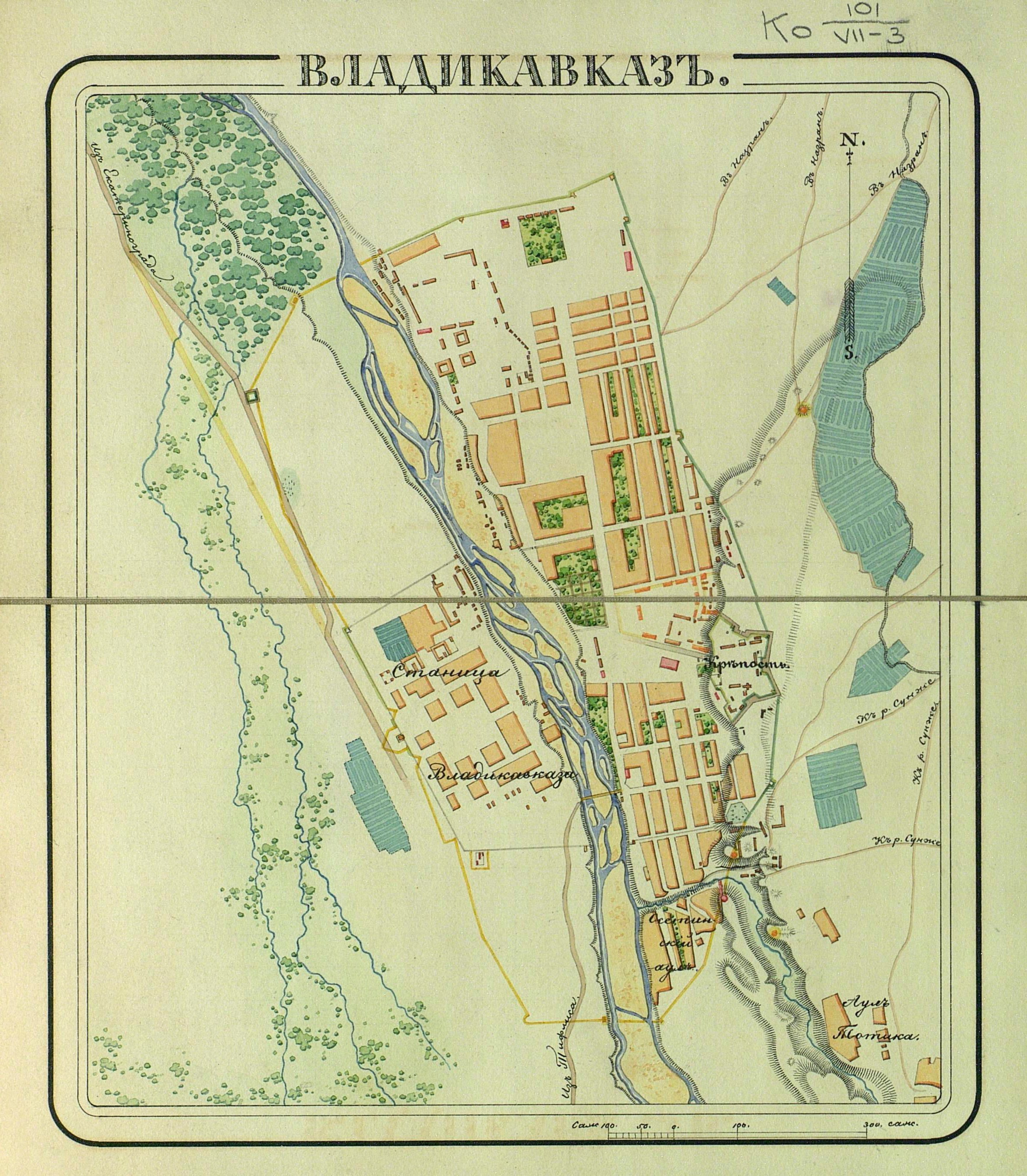 Владикавказ.